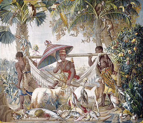 "Les nouvelles Indes" (sogen. Calecuttische Landschaften): Die Mohrenkönigin (Le roi porté par deux Maures). Wolle, Seide. Paris Gobelinmanufaktur, 1774-78